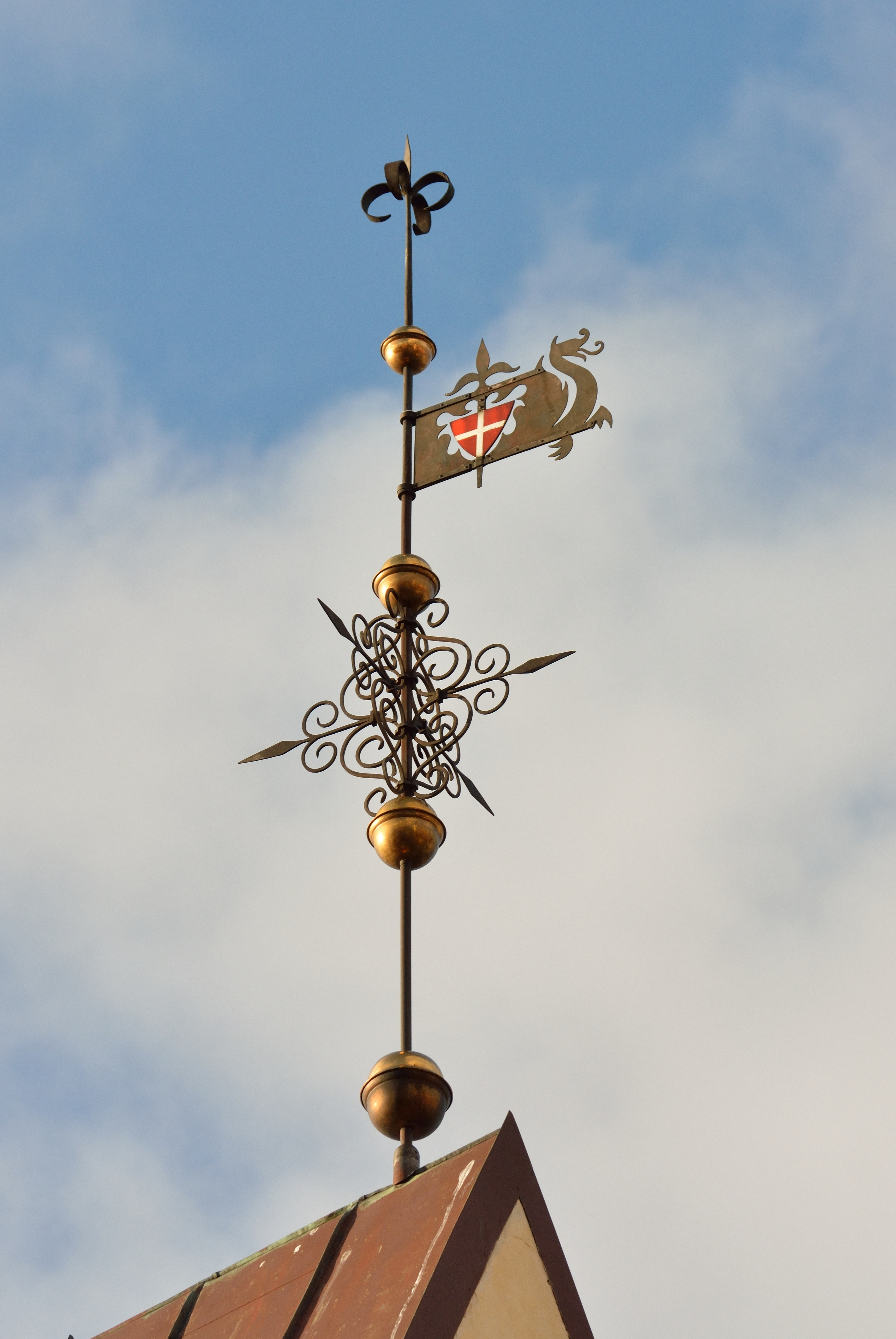 Tallinn, Suurgildi hoone tuulelipp